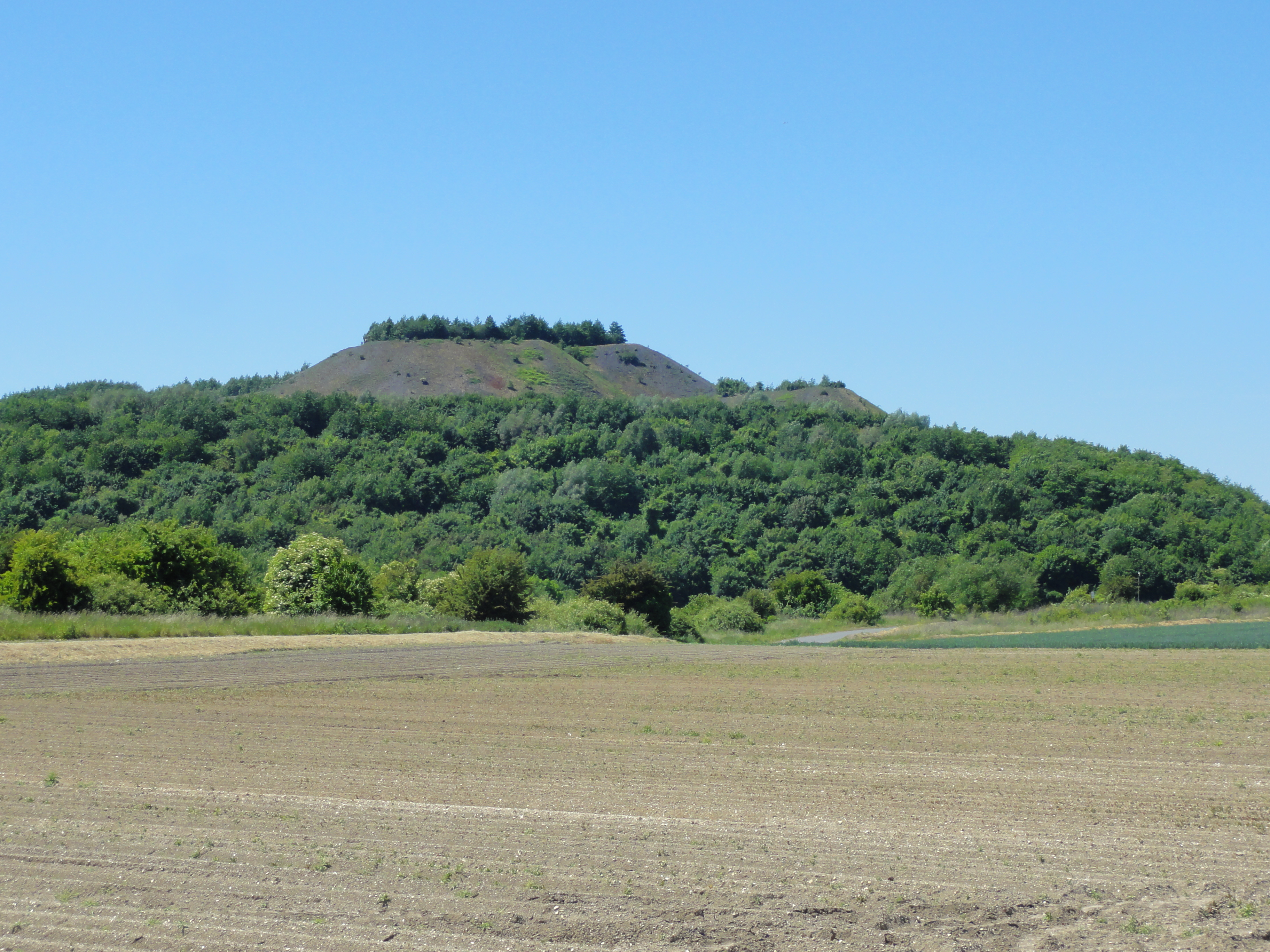 Terril no 58 dit Lavoir Mazingarbe Ouest, Lavoir de Mazingarbe de la Compagnie des mines de Béthune dans le bassin minier du Nord-Pas-de-Calais, Grenay et Mazingarbe, Pas-de-Calais, Nord-Pas-de-Calais, France. Le terril no 58 est inscrit sur la liste du patrimoine mondial par l'Unesco le 30 juin 2012 et y constitue en partie le site no 84.